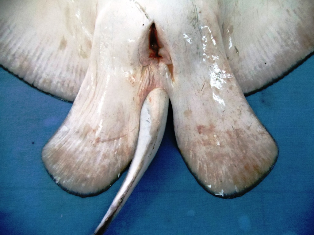 Скат рода пятнистых орляков